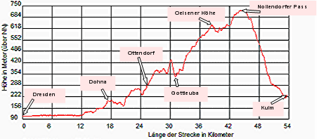 Höhenprofil Kulmer Steig